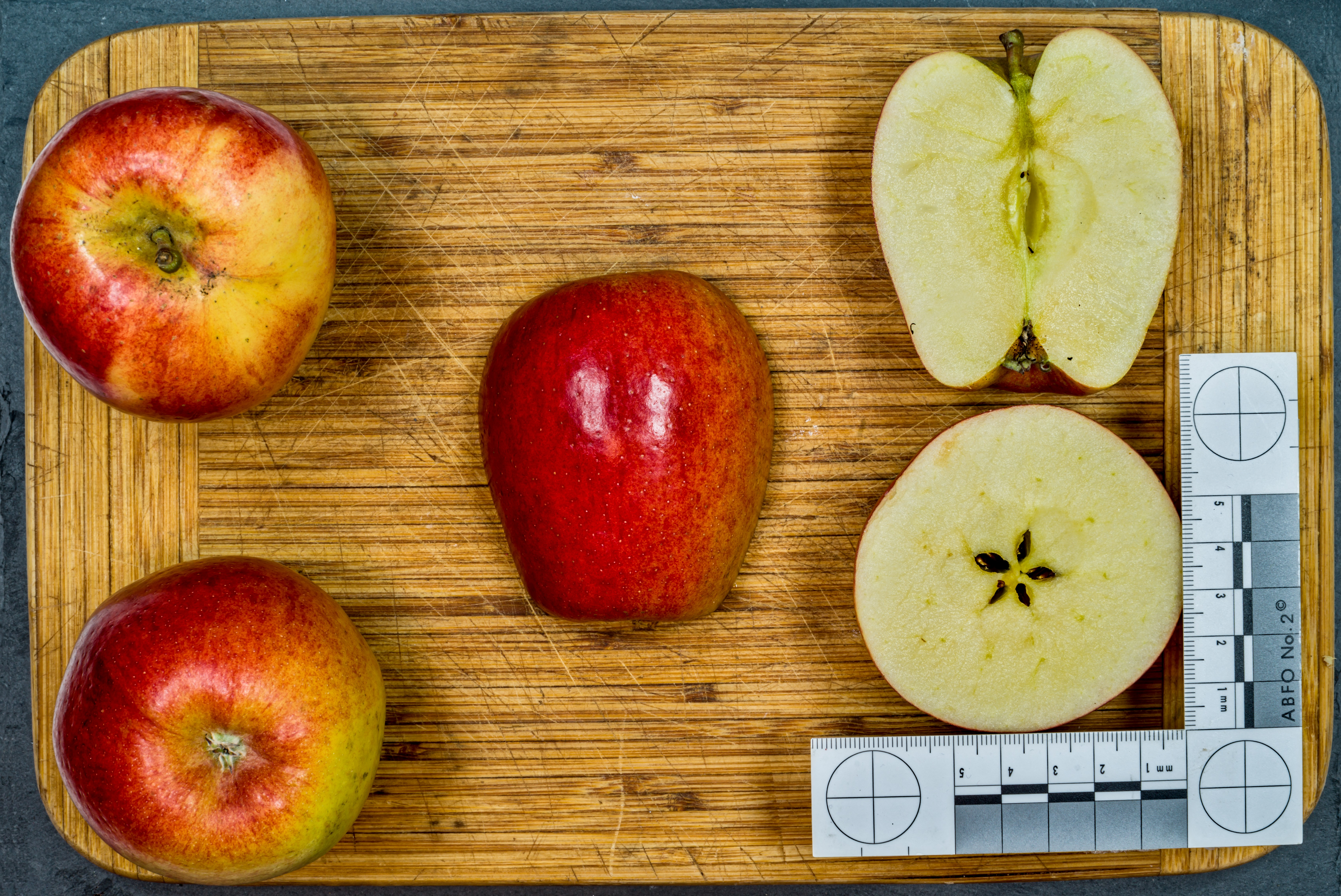 Apfelsorte: Scifresh auch Clubsorte Jazz, Markteinführung 2003 Herkunft Neuseeland Braeburn x Toyal Gala